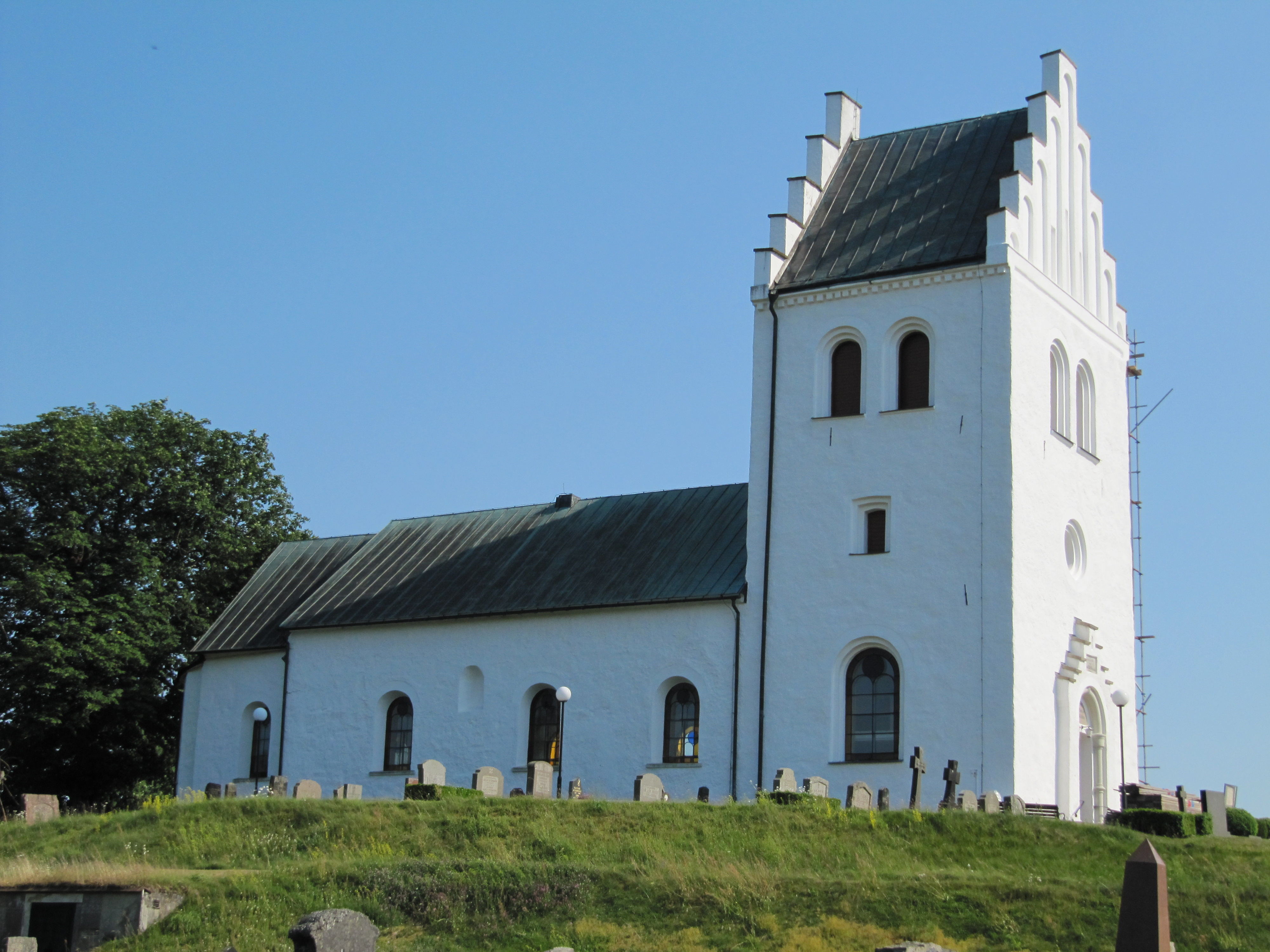 Västra Torups kyrka